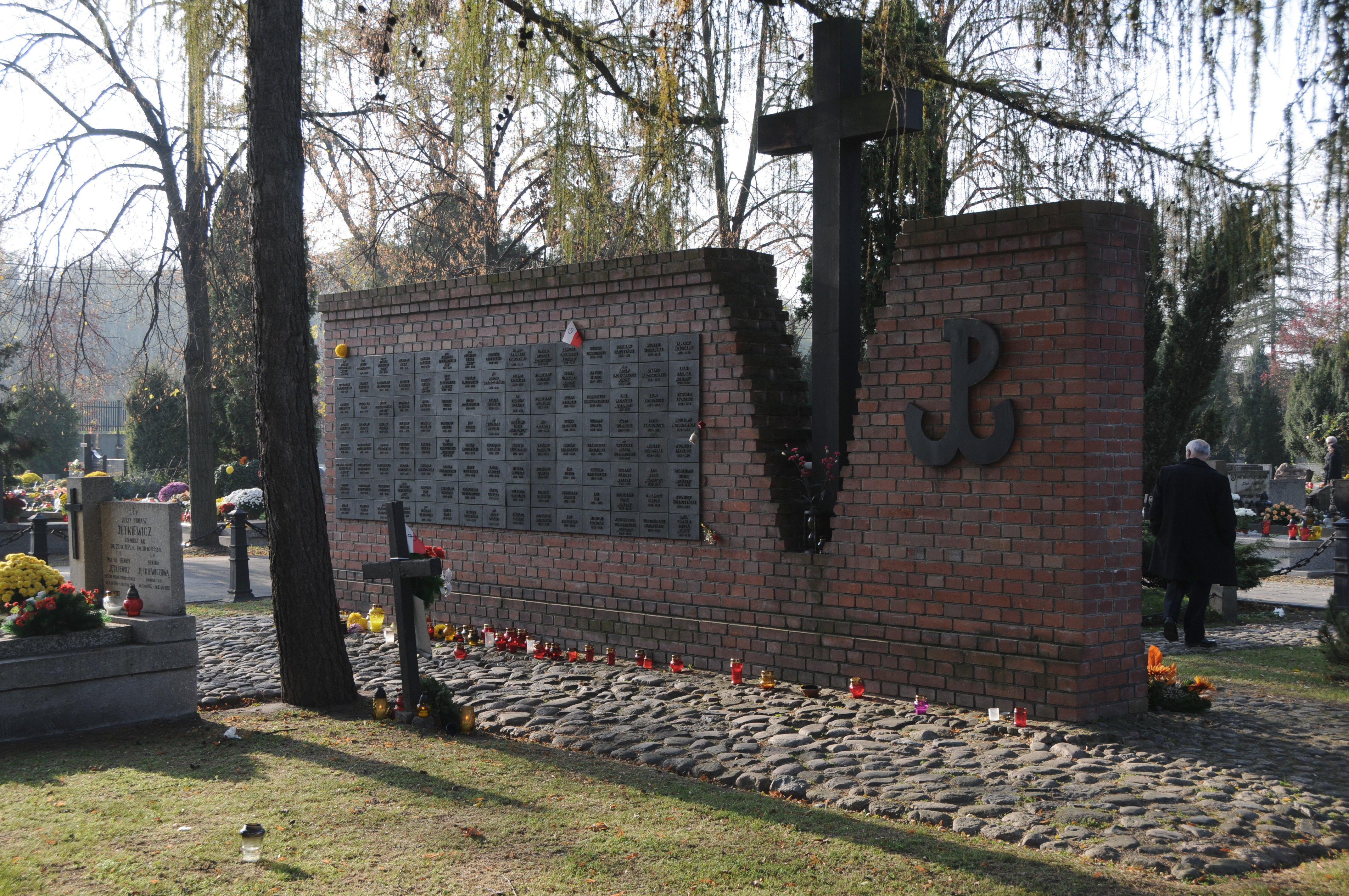 Zdjęcia Kwatery "Na Łączce" Cmentarza Wojskowego